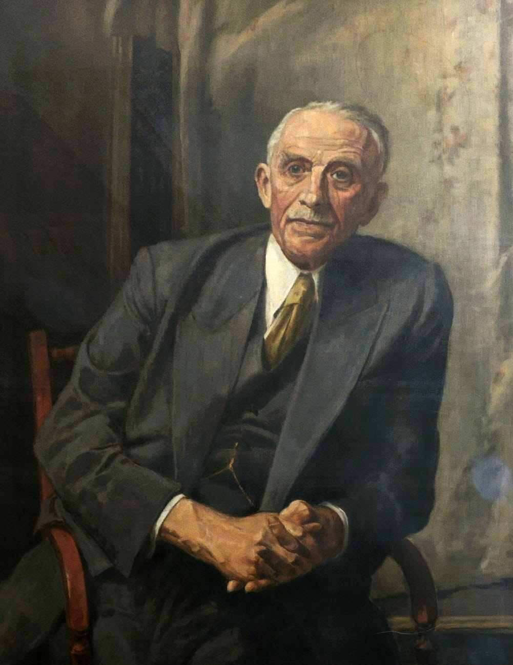 Gemälde "Oberbürgermeister Emil Lueken" (1957) von Maler Willi Langbein.